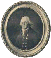 Portrait de Georges Jacob (1739-1814), par Simon Julien, HST, 1793